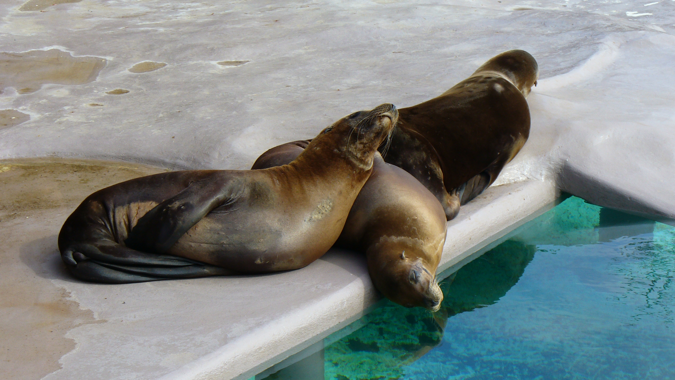 Uchatki kalifonijskie (Zalophus californianus) w opolskim ZOO